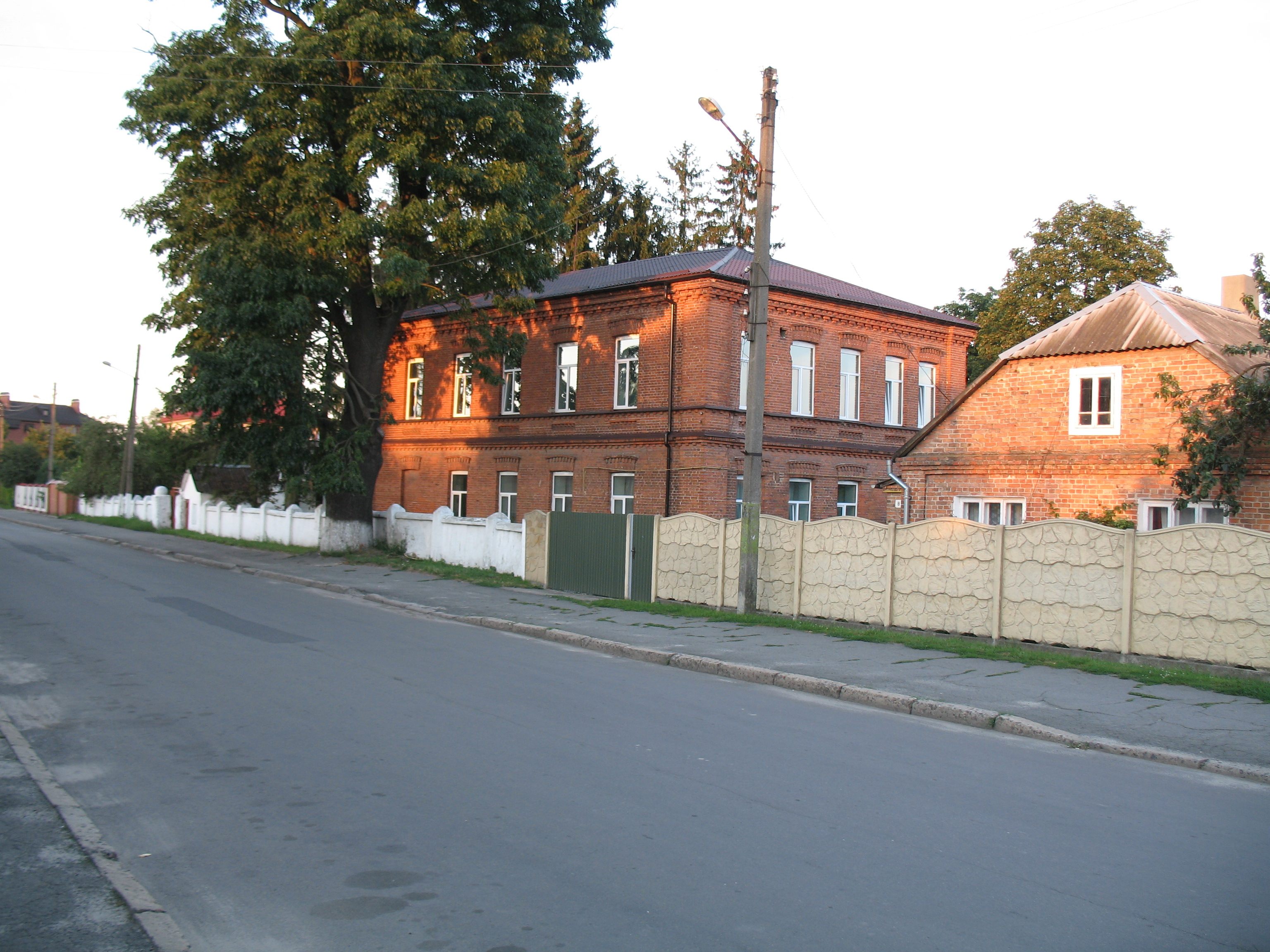 Володимир Волинський. Червона лікарня